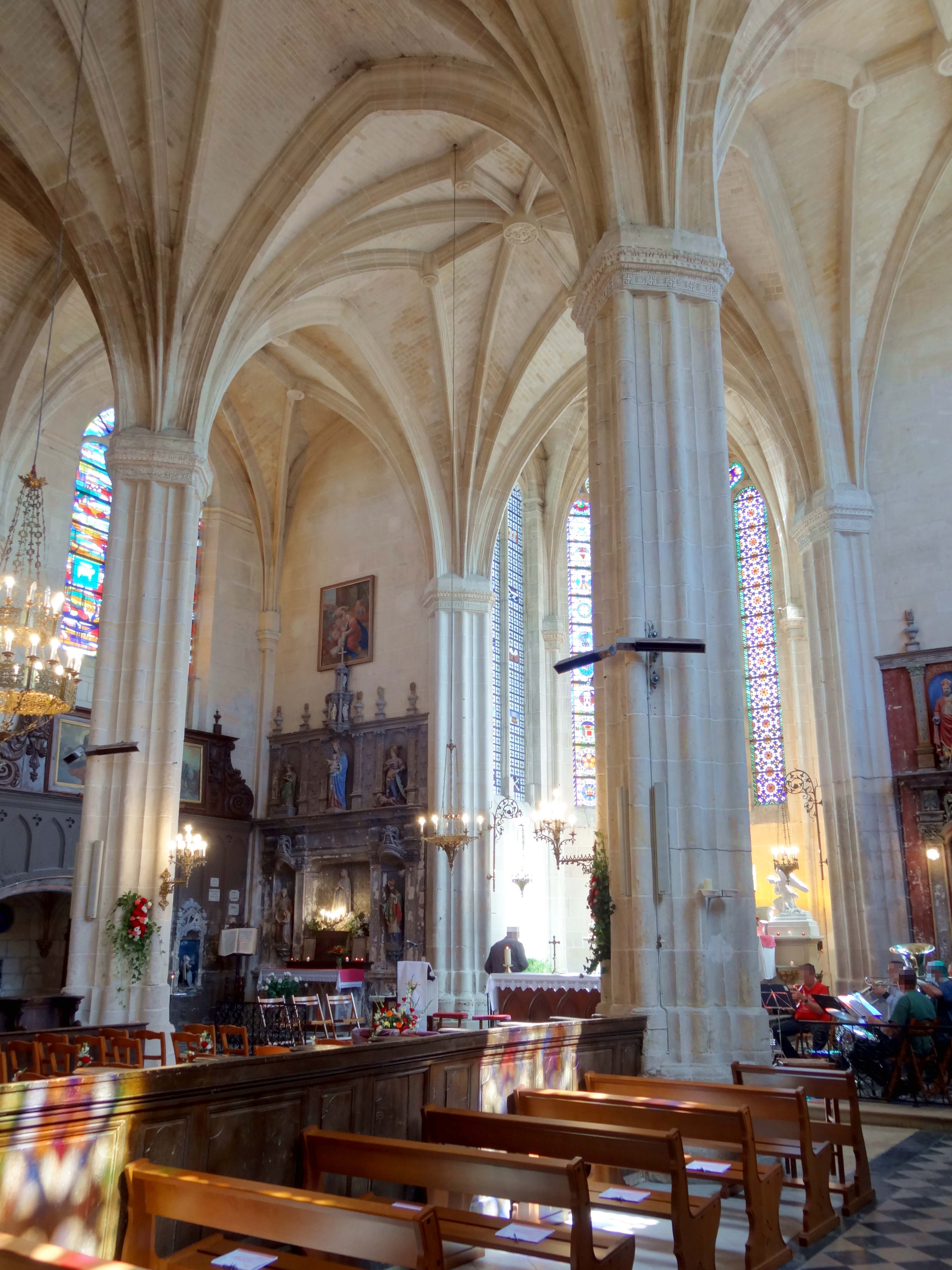 Intérieur de l'église - voir titre.